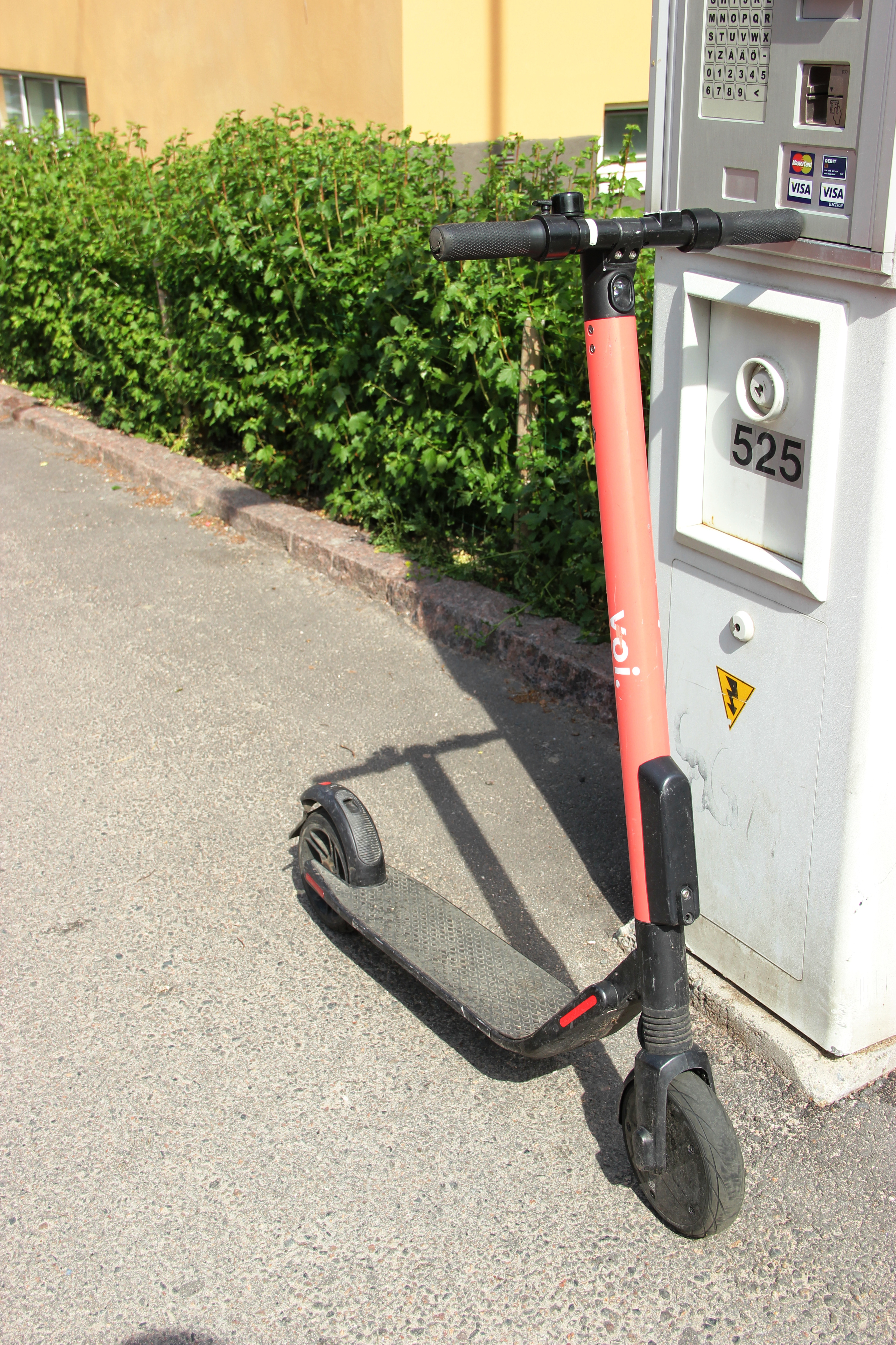 Sähköpotkulauta Voi Helsingissä Jalavatiellä pysäköintiautomaatin viereen jätettynä.